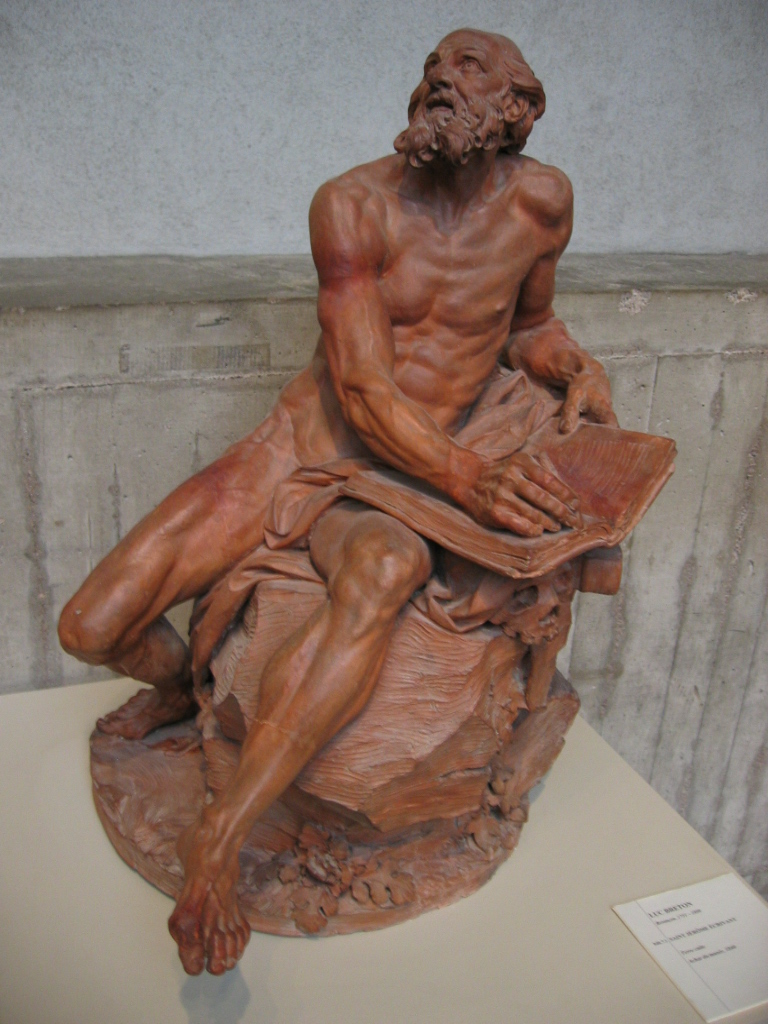 Saint Jérome écrivant - XVIIIe siècle - Terre cuite de Luc Breton